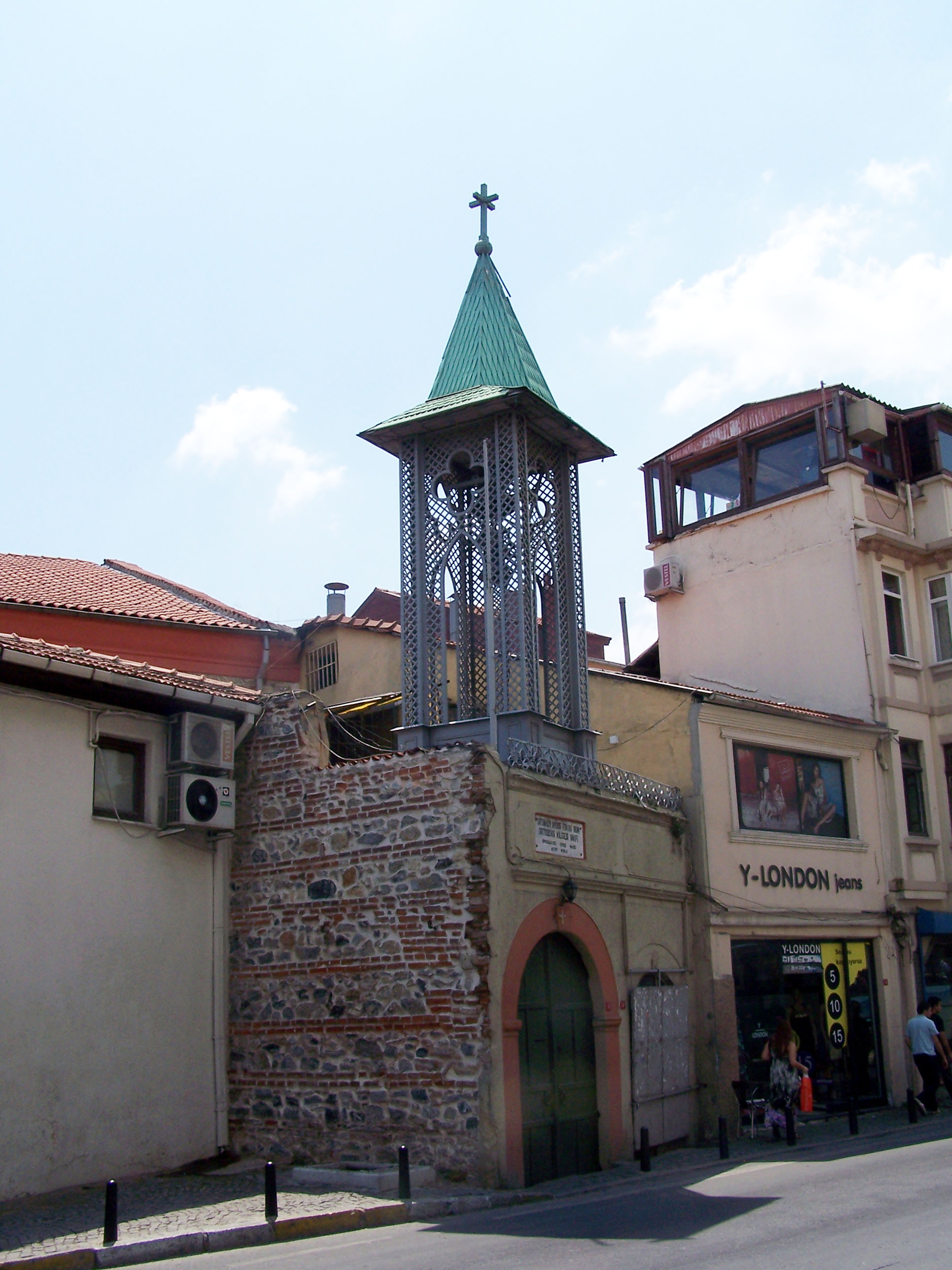 Ayios Fokas Rum Ortodoks Kilisesi in Ortaköy-Beşiktaş, İstanbul, Turkey